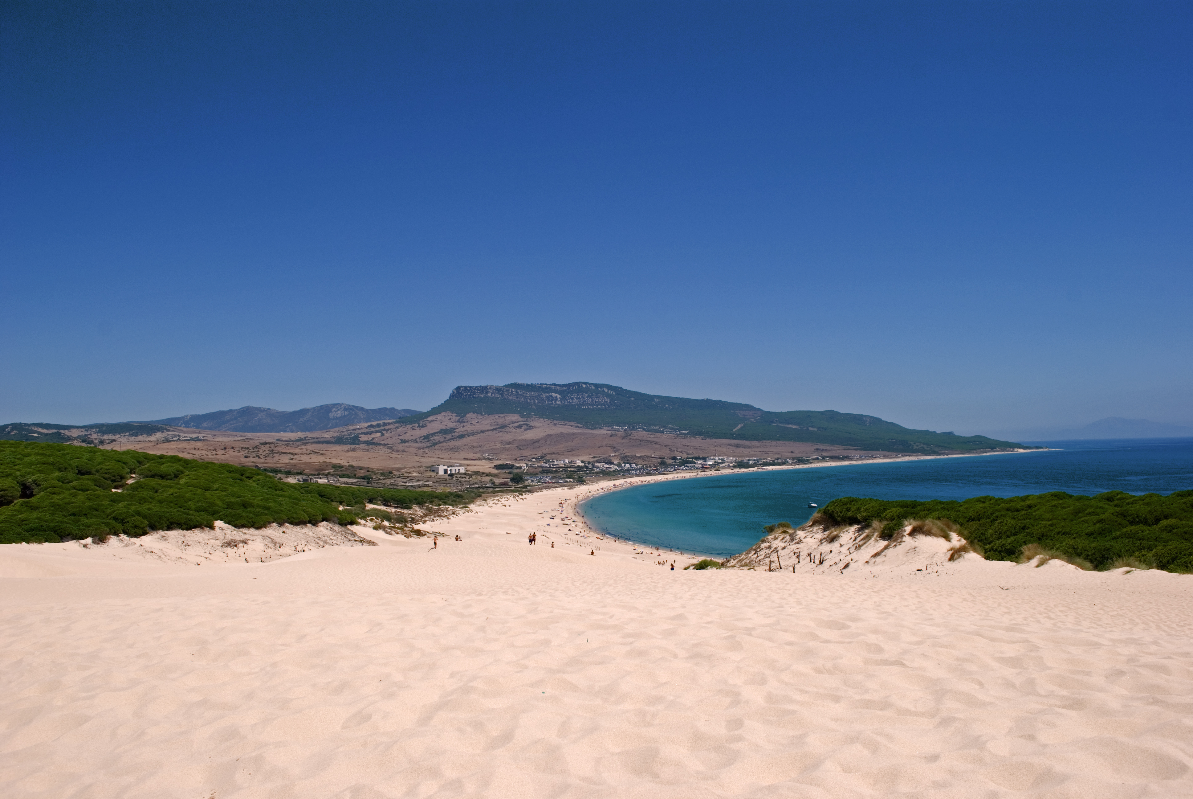 Ensenada de Bolonia, provincia de Cádiz, España